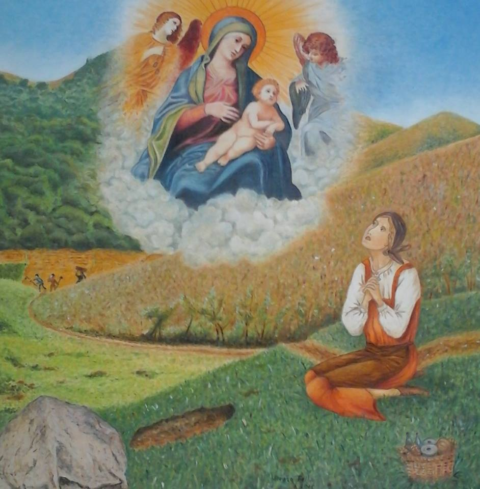 Acquafondata,16 luglio 1841